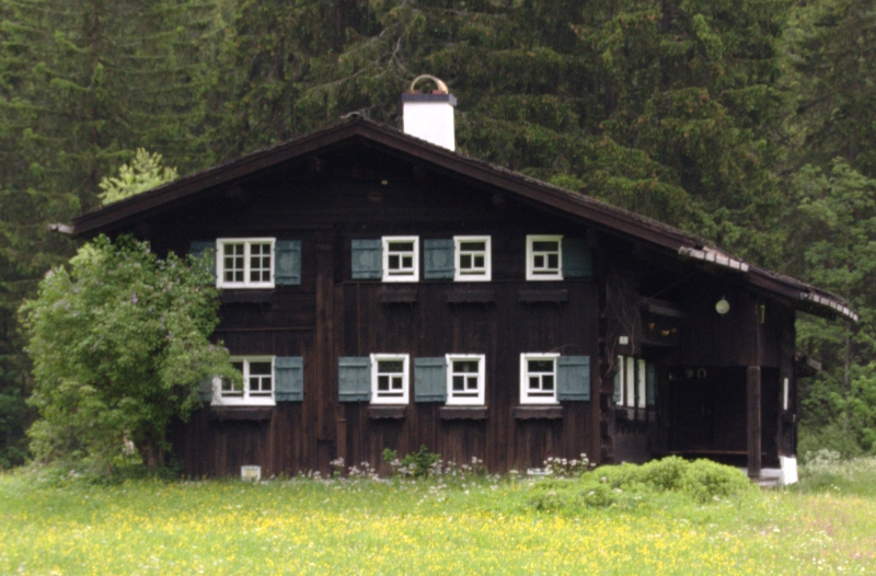 Wohnhaus Gemstelboden 4 Mittelberg, Vorarlberg